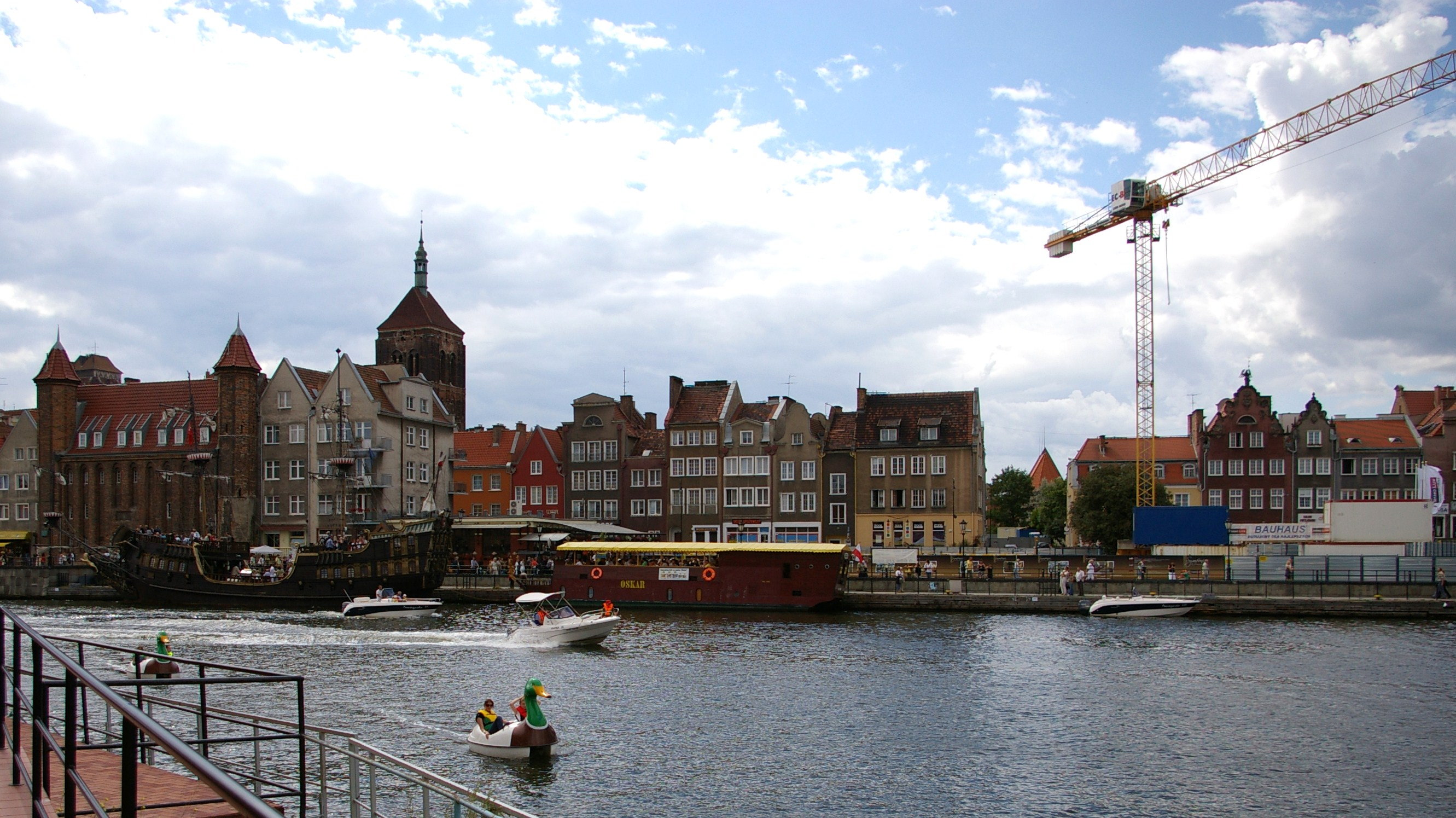 Rybackie Pobrzeże i fragment Targu Rybnego w Gdańsku, przed zabudową wschodniej części.